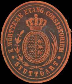 Sealing stamp Title: K. Württemb. Evang. Consistorium Stuttgart Description: schwarz, rot, geprägt Place: Stuttgart size: 3x3 cm